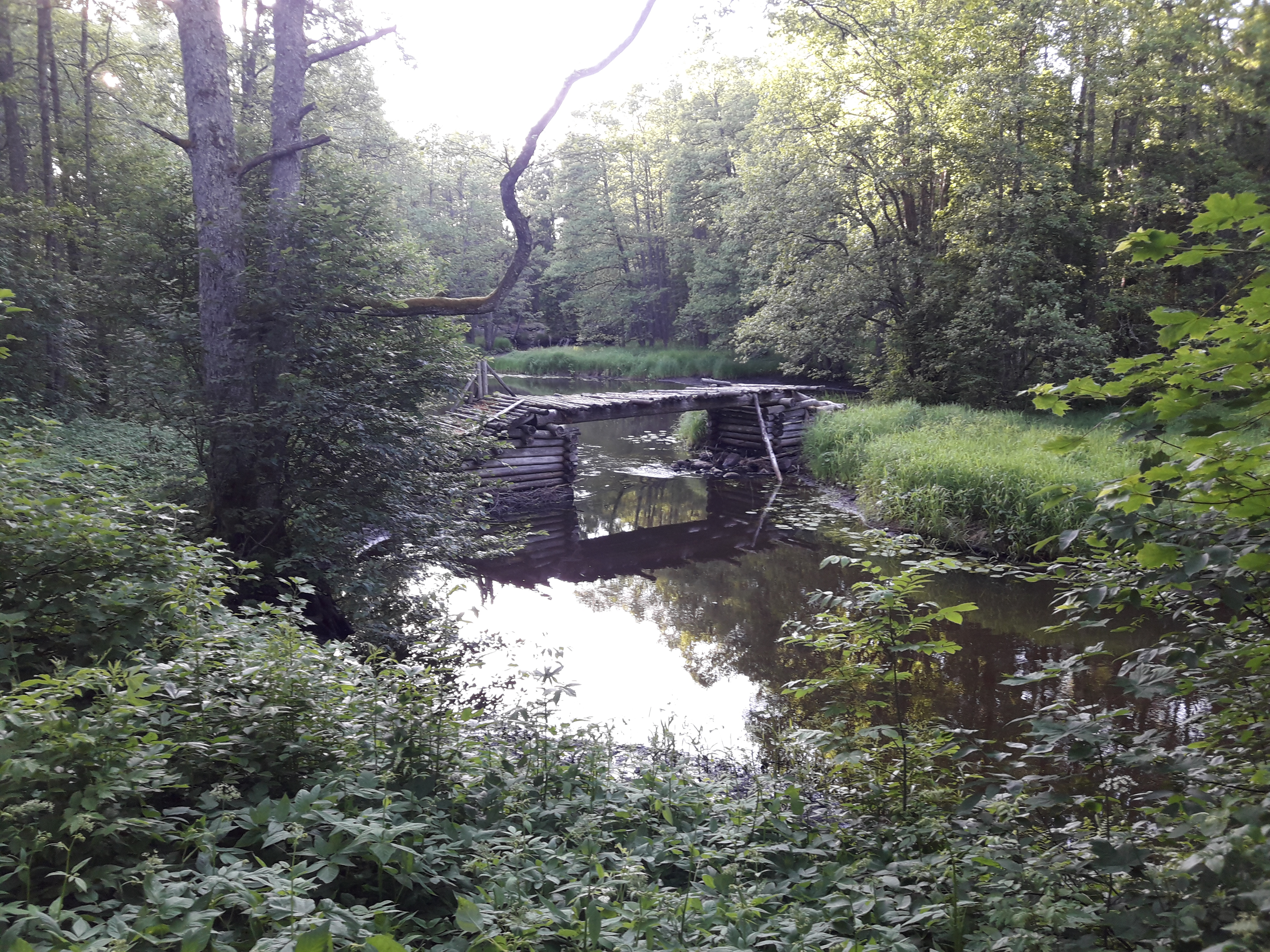 Sild üle Soodla jõe, ehitatud aastal 2000 (Jaak Veisserik)